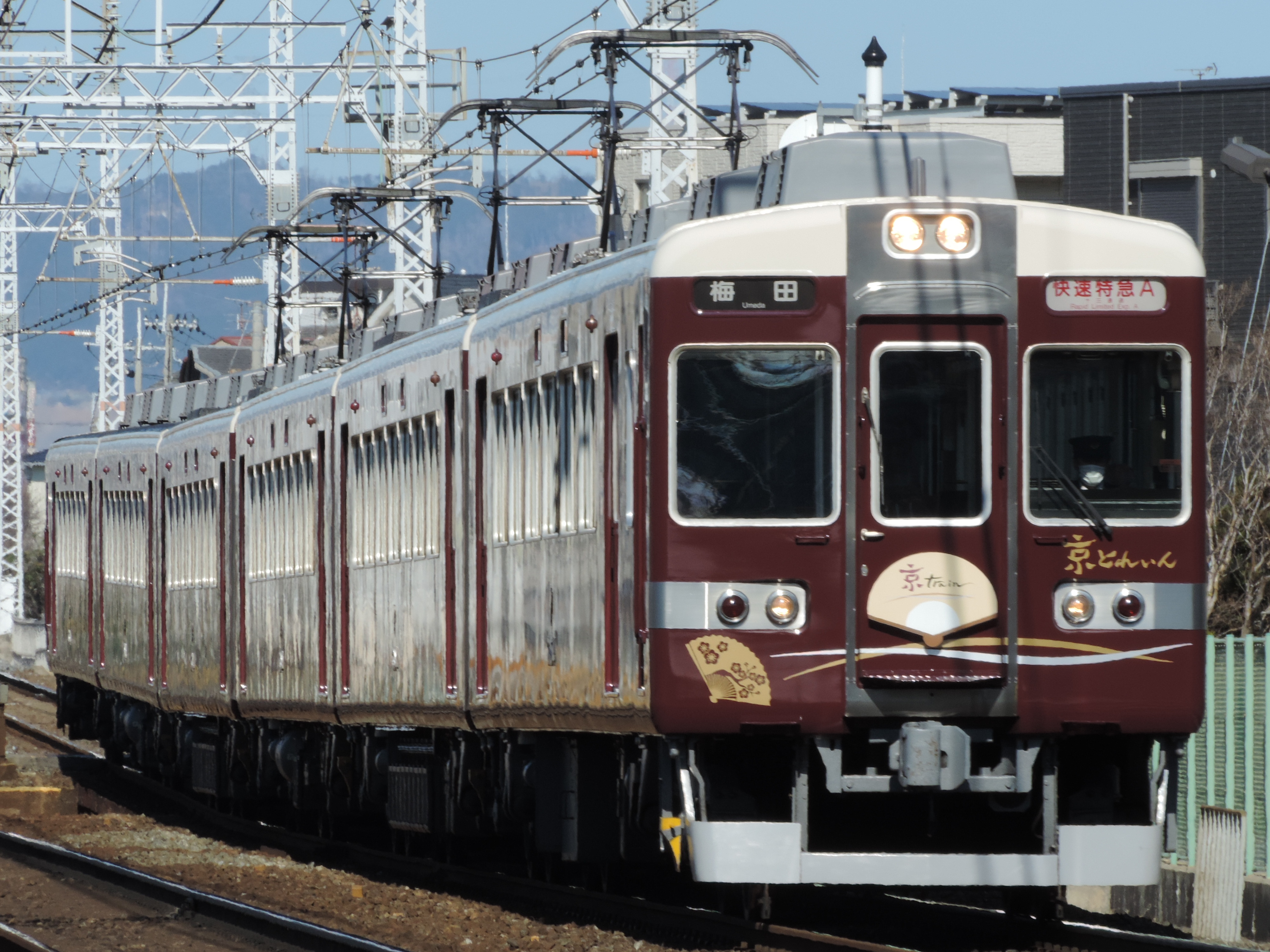 快速特急Aとして運行する6354F 南茨木~茨木間にて